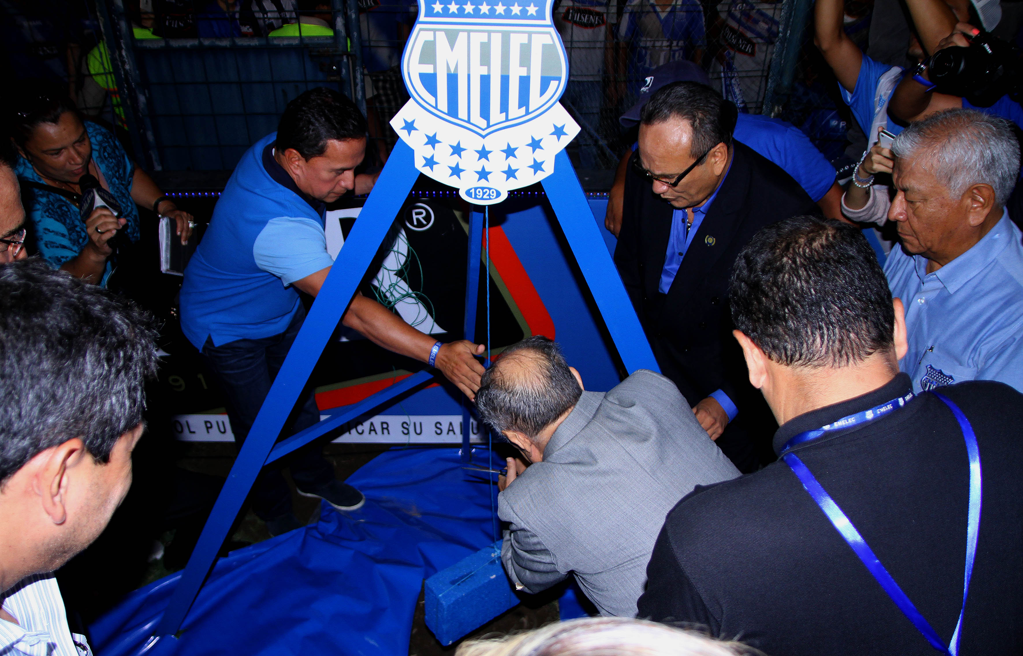 Guayaquil, martes 27 de enero del 2015 (ANDES).-Durante la explosión azul Emelec se realizó la colocación de la primera piedra de los trabajos de remodelación en el estadio Capwell Foto:César Muñoz/ANDES